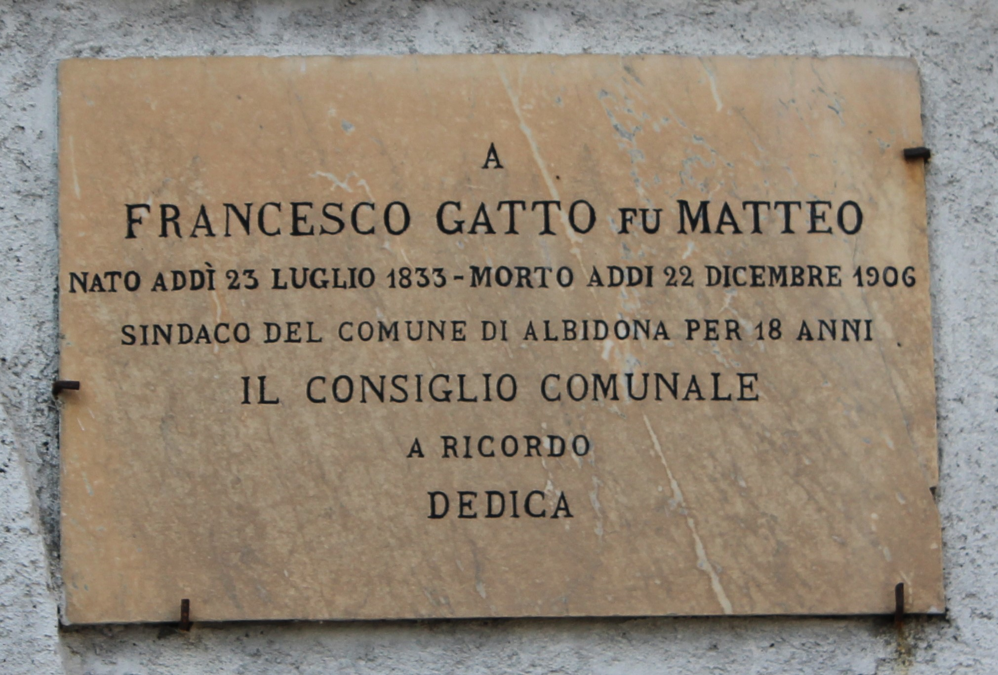 Targa in memoria del sindaco Francesco Gatto (Albidona).